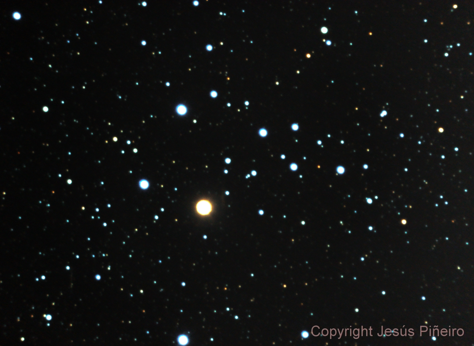 Telescopio u objetivo: Meade SCT OTA 10" f6.3 Cámara fotográfica: Canon EOS 50D Montura: Home made with Byers 7.5" drive Fechas: 24 de Enero de 2014 Tomas: 16x120" ISO1600 Tiempo de integración: 0.5 horas job: 175515 A.R. (centro): 116,256 grados Dec. (centro): -38,016 grados Escala de píxel: 0,800 seg.arc/píxel Orientación: 88,040 grados Radio del campo: 0,403 grados Ubicaciones: San Antonio de los Altos, Miranda, Venezuela